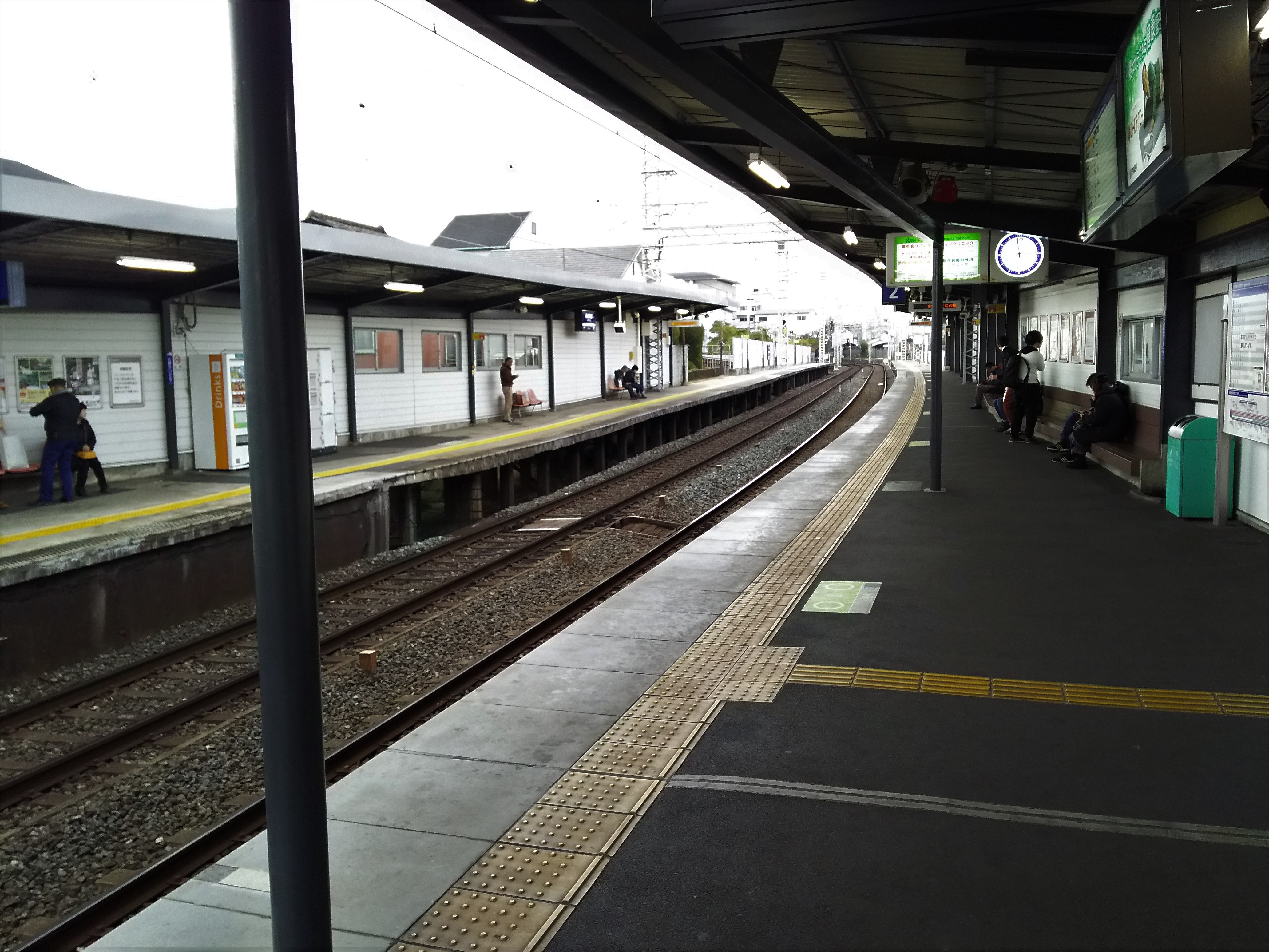 京阪本線鳥羽街道駅プラットホーム（京都市東山区）